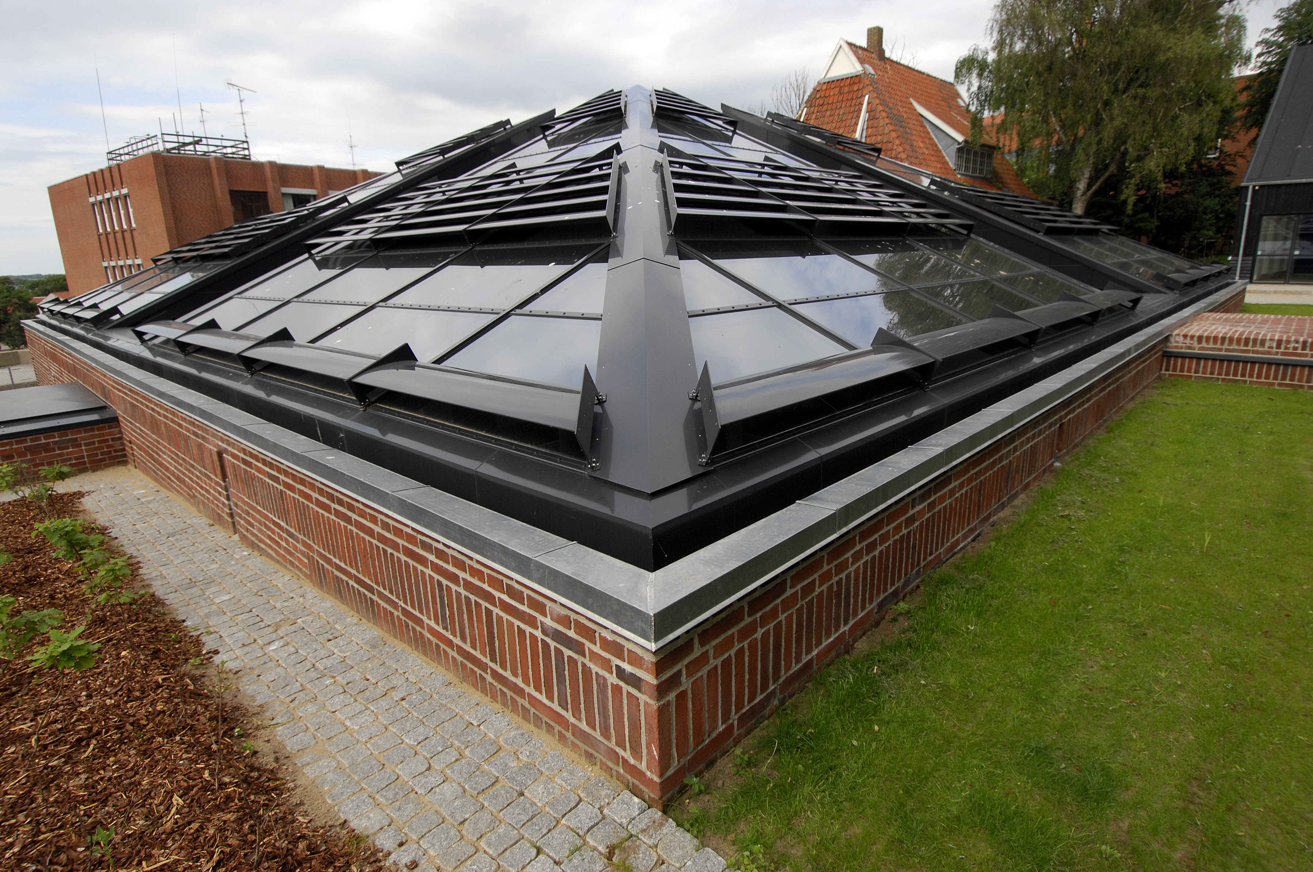 Struer Museums pyramide i 2008